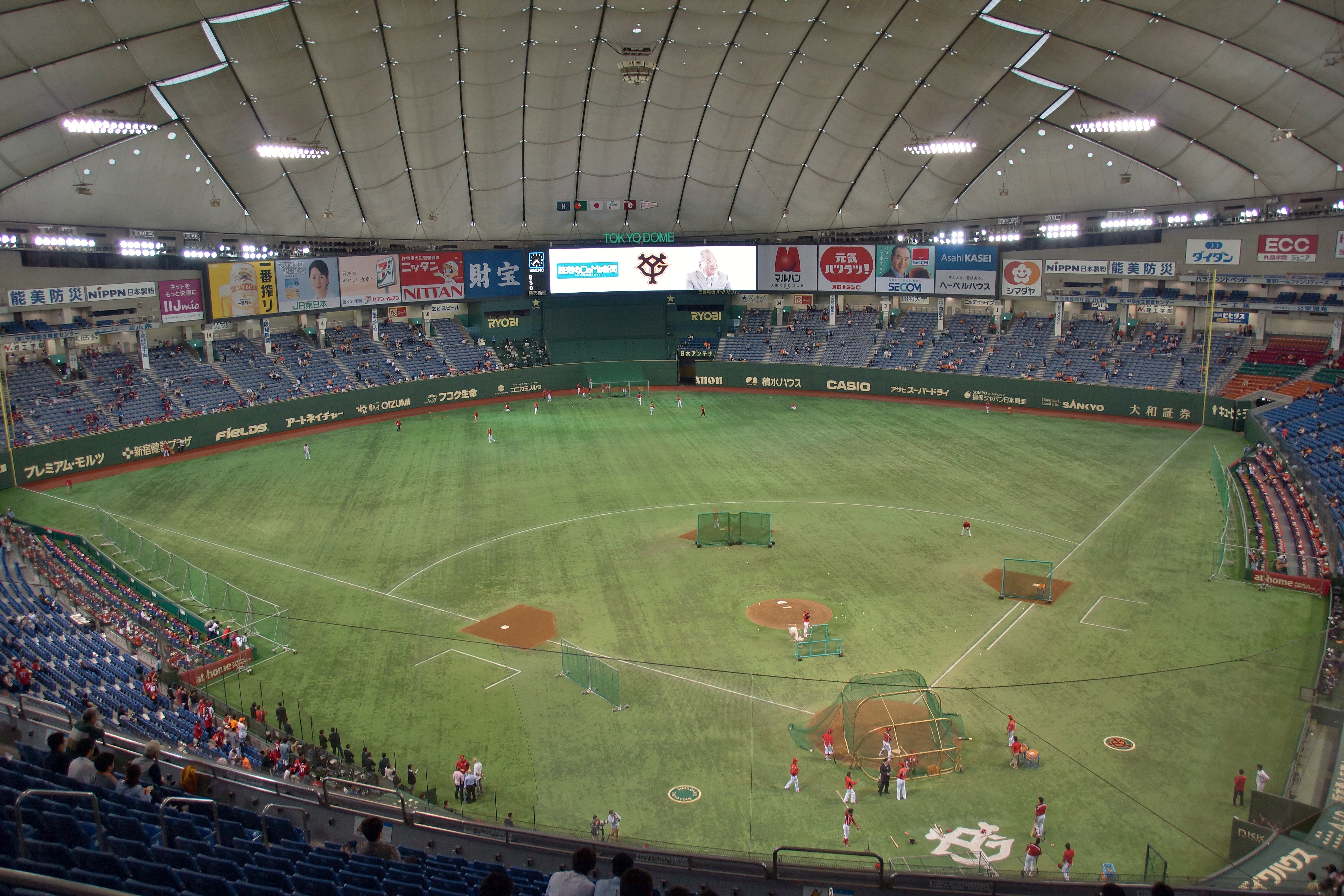 東京ドーム4階スタンドからのグラウンド全景。